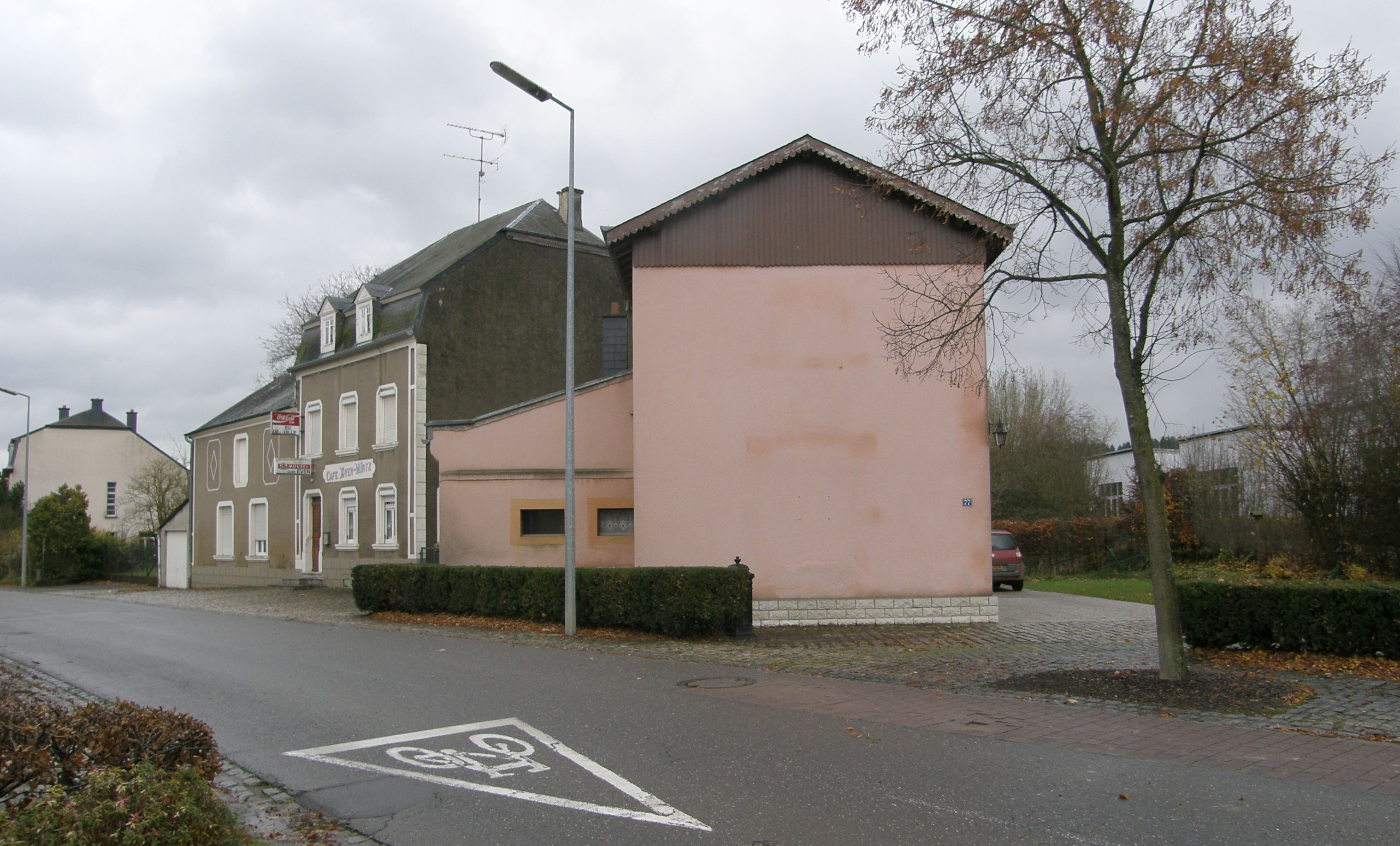 Den Huewelerhalt.